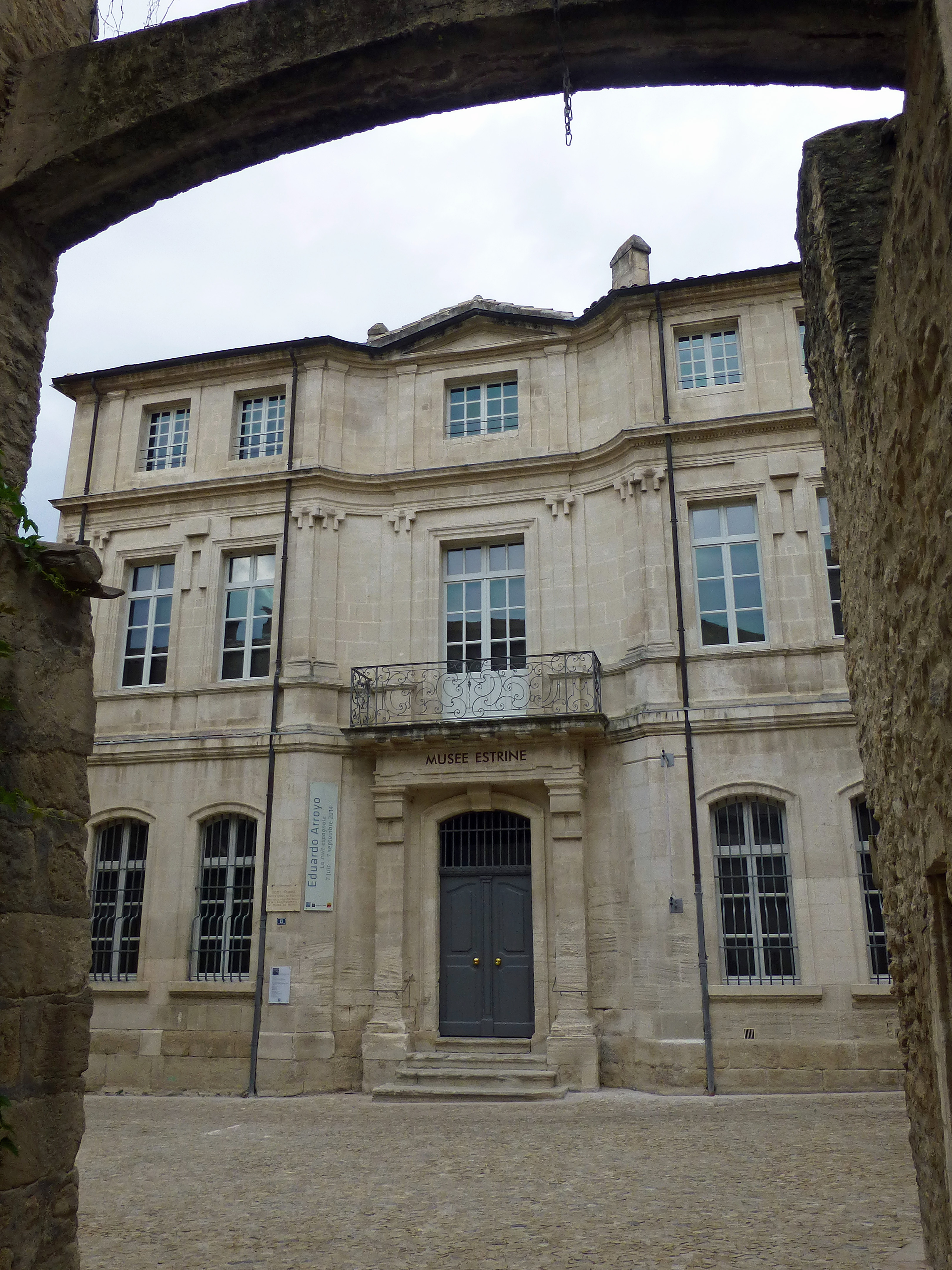 Musée Estrine à Saint-Rémy-de-Provence (Bouches-du-Rhône)